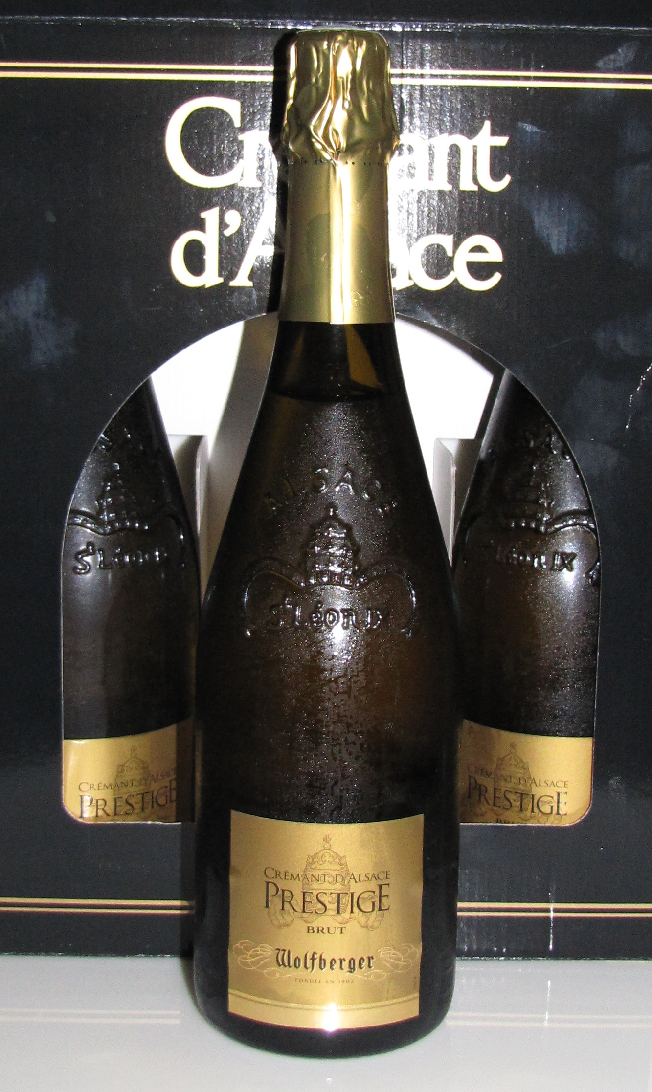 La bouteille de Crémant d'Alsace de marque Wolfberger.